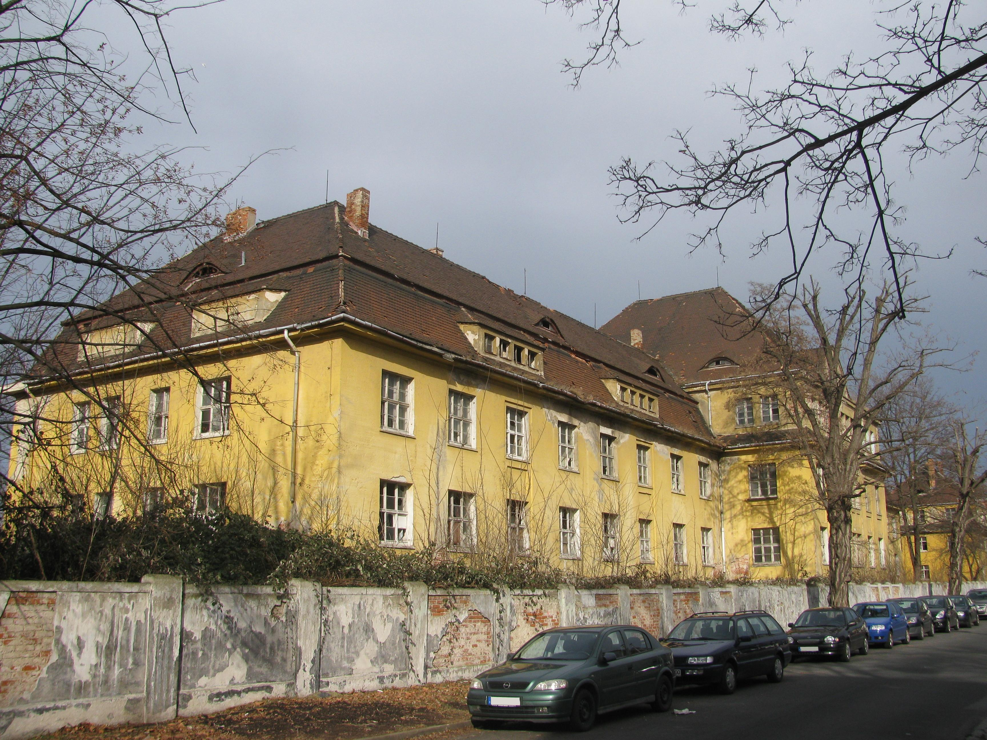 Kaserne Übigau, Dresden, gelbes Kasernengebäude an der Klingerstraße